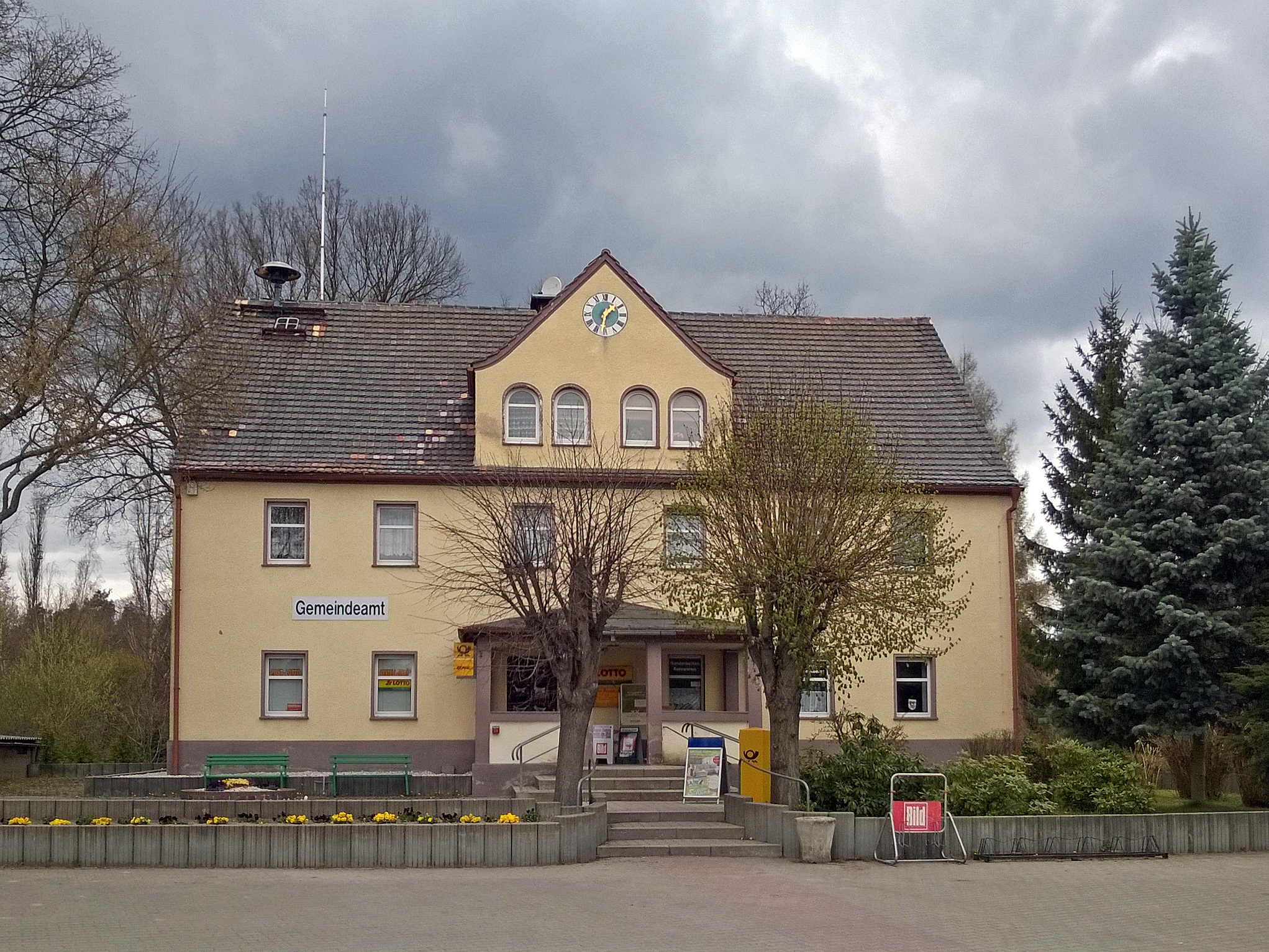 Herrenhaus Mücka, Nutzung u. a. als Gemeindeamt